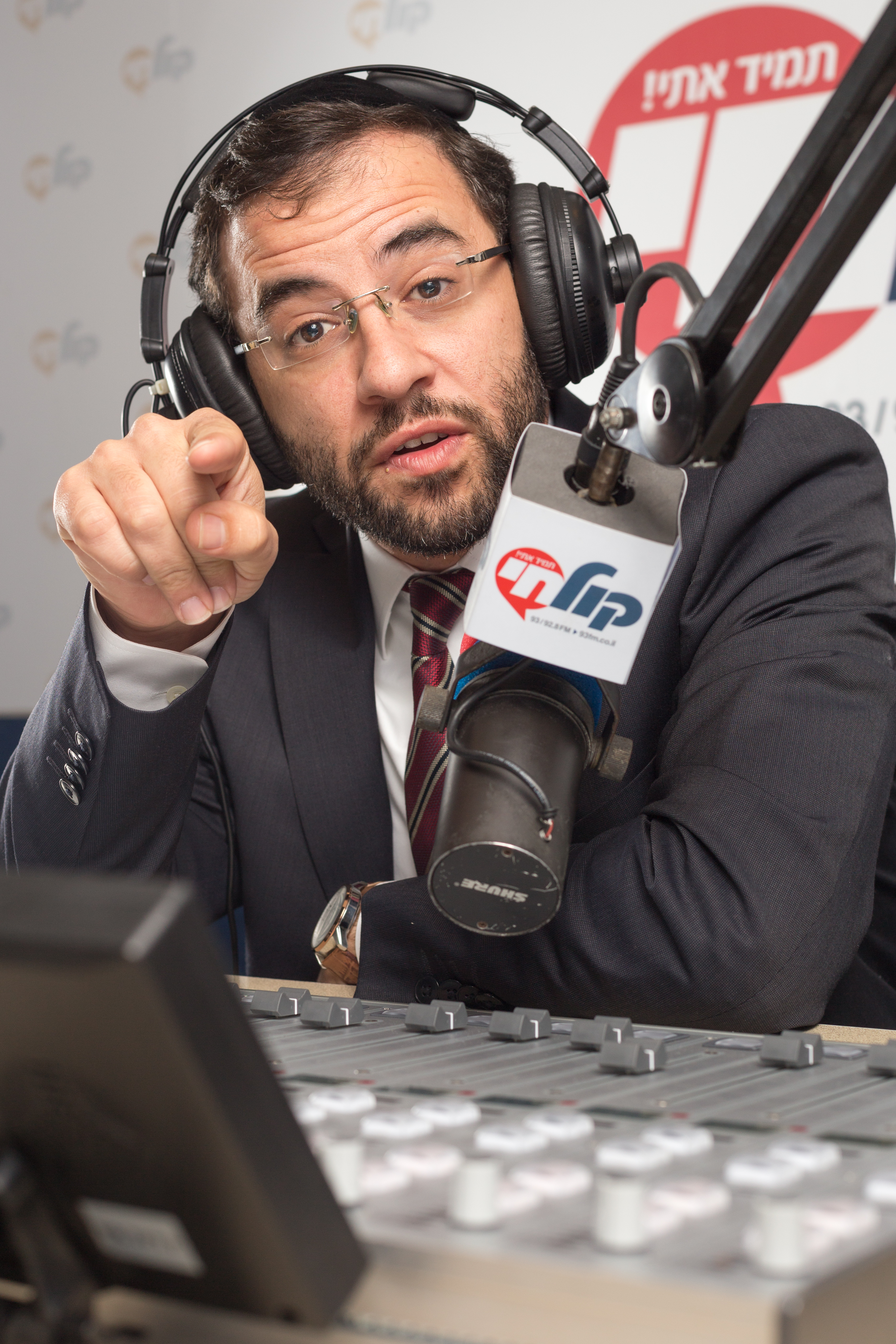 אבי מימרן באולפן רדיו קול חי